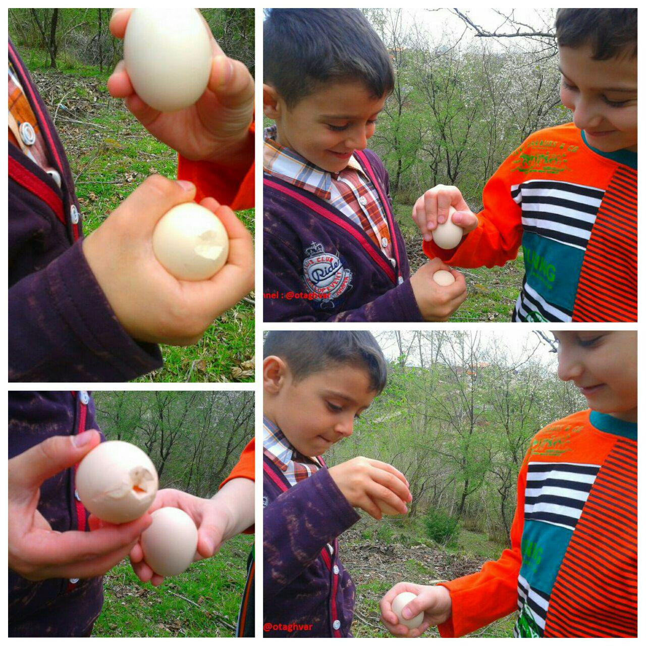 بازی بومی عید نوروز (مرغانه جنگ)